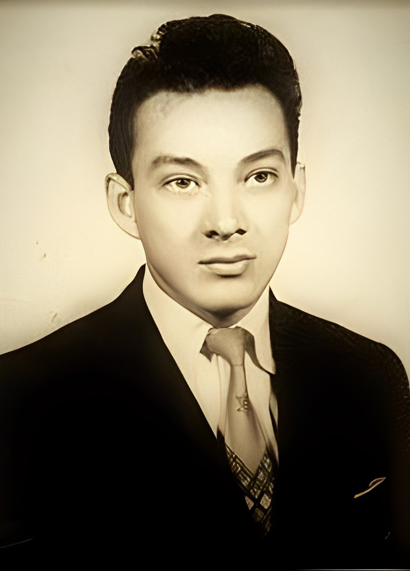 Bernardo Aranda asesinado en 1959 durante el Caso 108